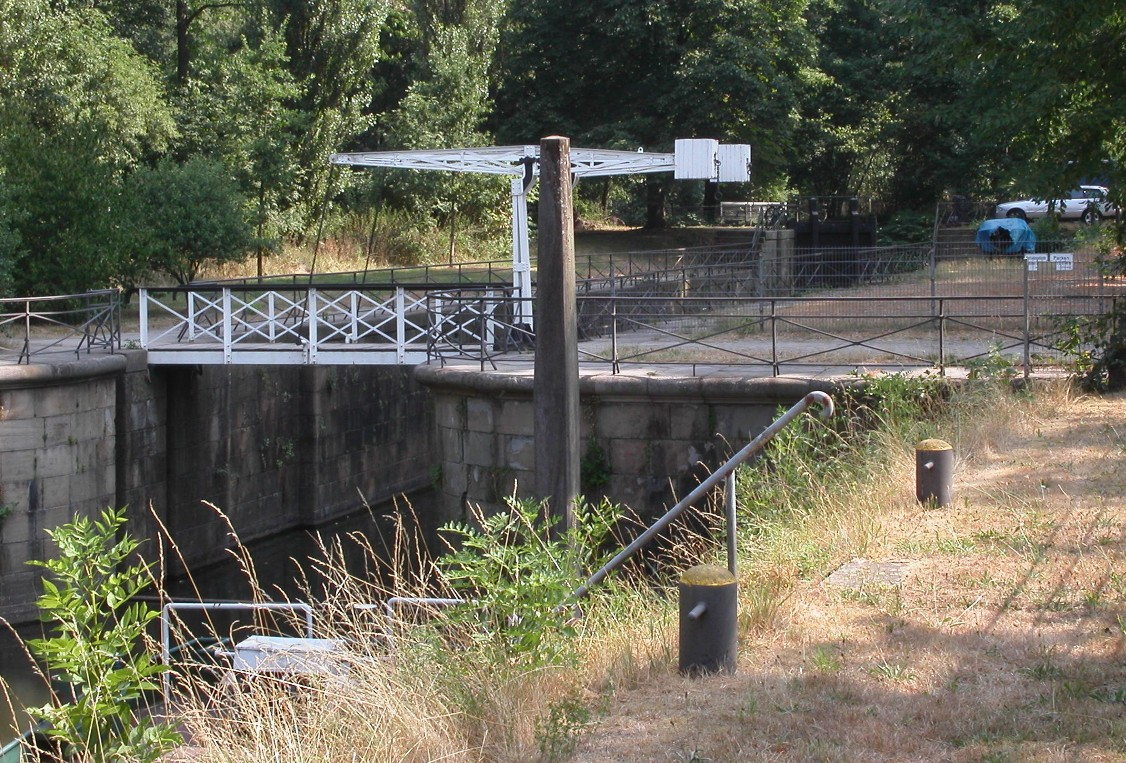 Papiermühlenschleuse